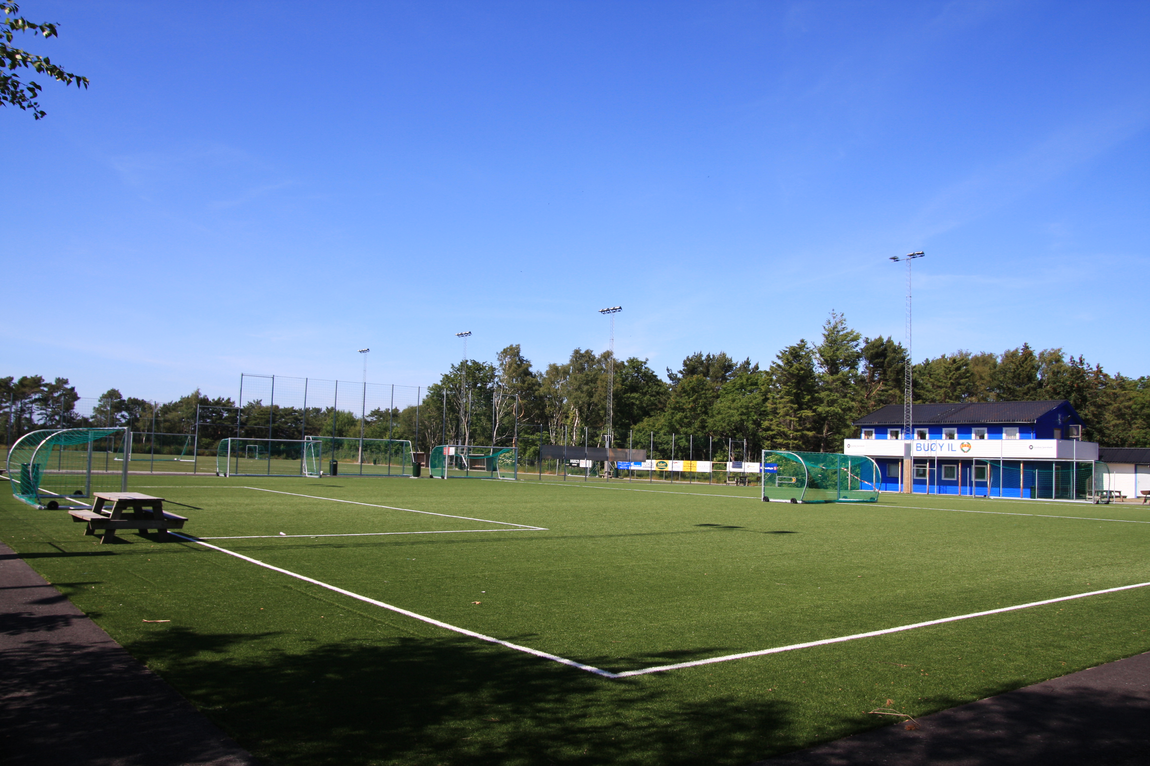 Hompen, Buøy IL's Stadion Stavanger